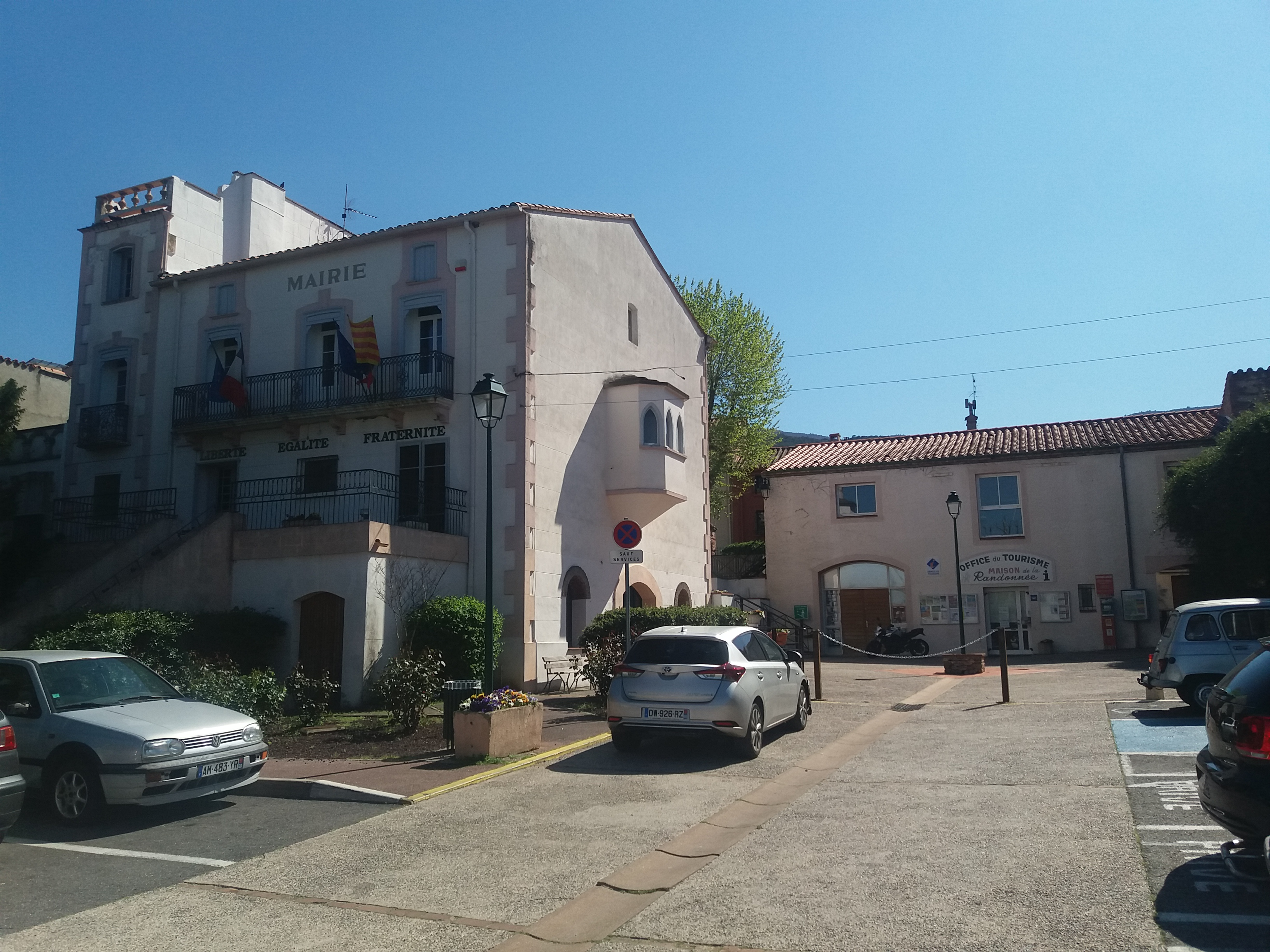 La Casa del Comú de la Roca d'Albera